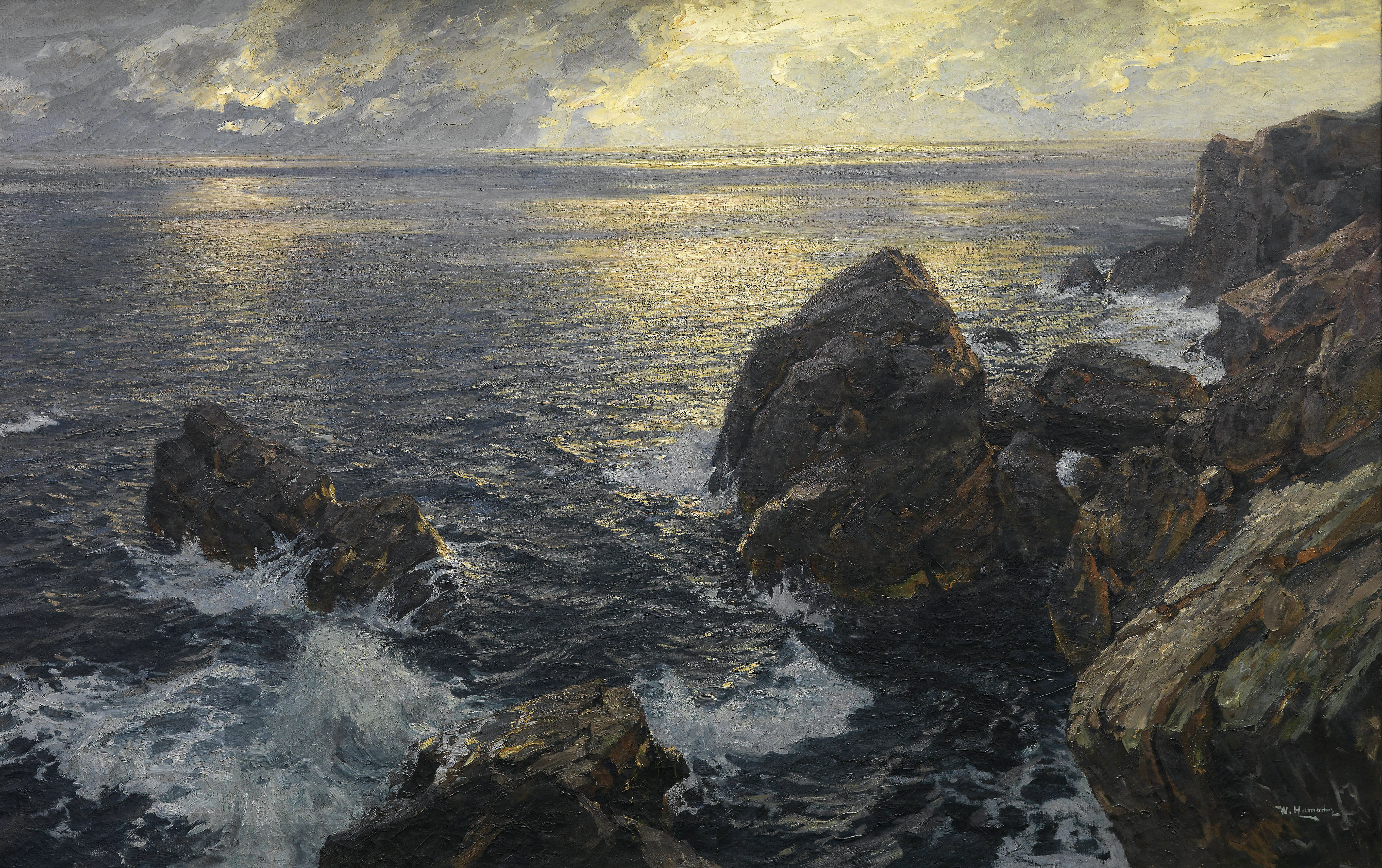 "Meeresweite", rückseitig betitelt, signiert Willy Hamacher, rückseitig etliche alte Klebezettel; auf diesen betitelt und bezeichnet, Öl auf Leinwand, 160 x 251 cm